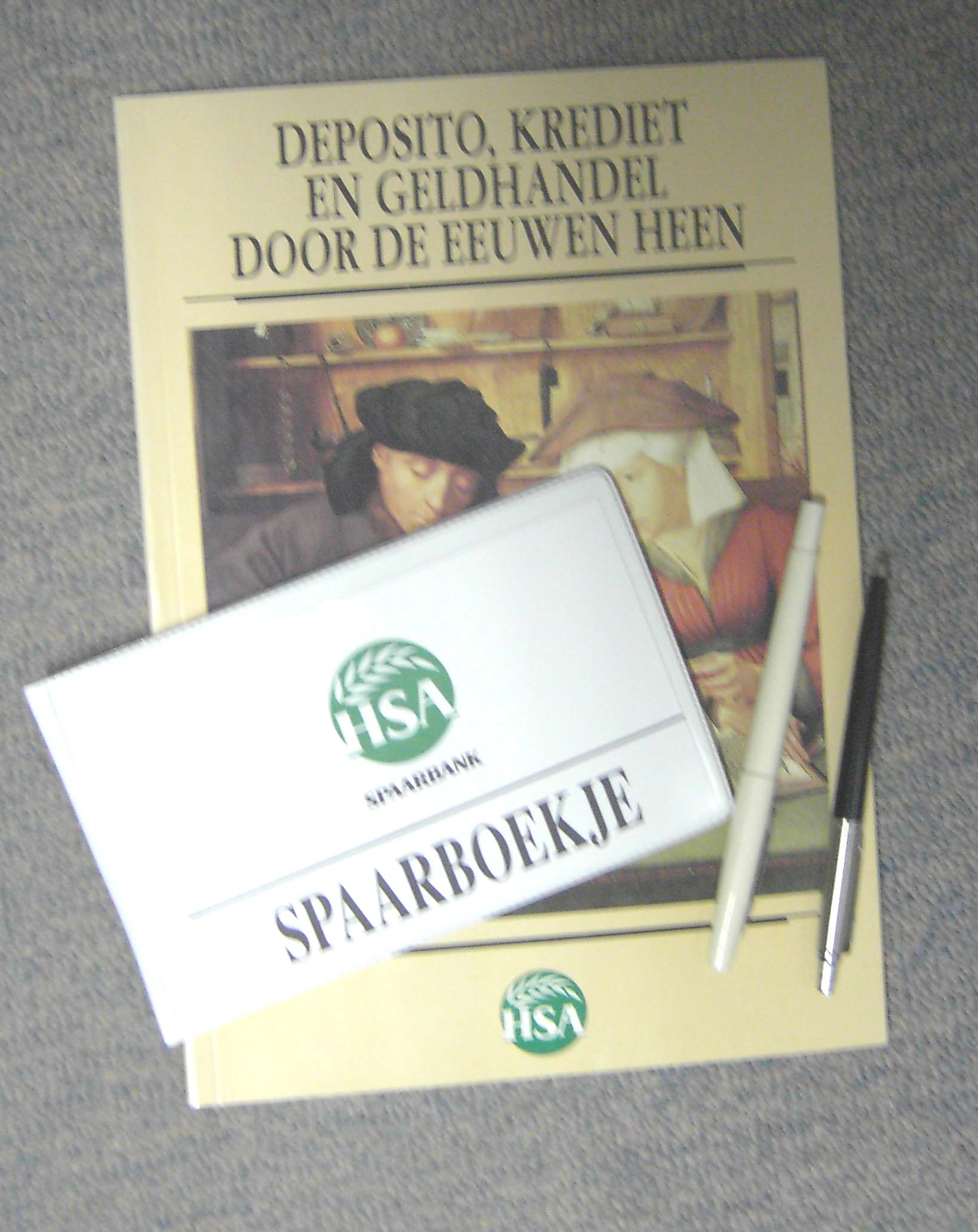 HSA - boek en boekje uit het publiek domein - Antwerpen - Provincie Antwerpen - Vlaanderen - Belgium HSA ging op in Centea, Centea in Crelan